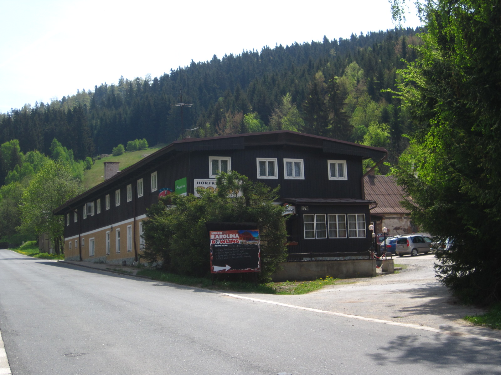 Sklárna – zbytky šachet a pecí, Jedlová v Orlických horách 178, u hotelu Alba, Jedlová v Orlických horách.